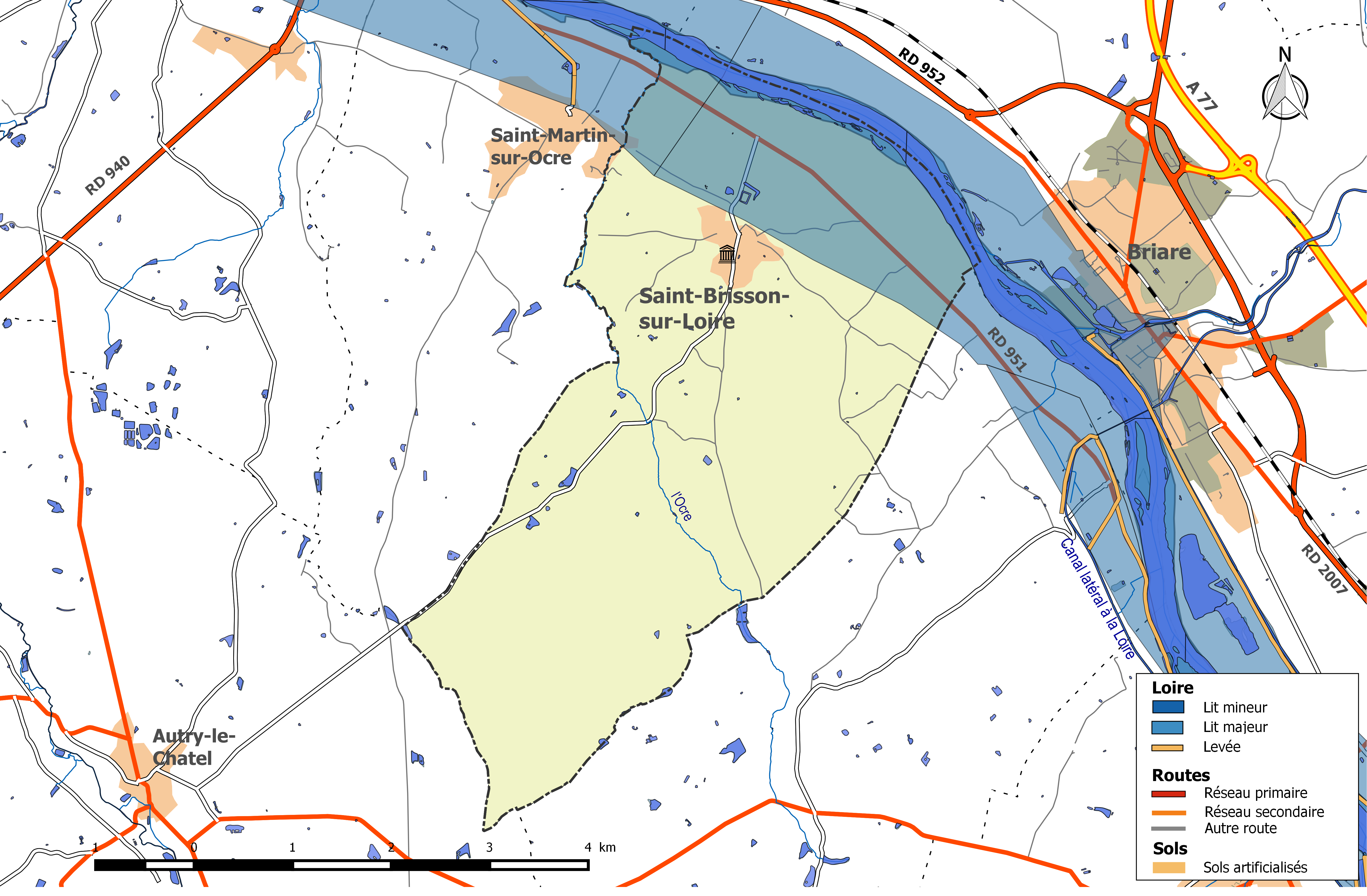 Zone inondable et réseaux hydrographique et routier de la commune de Saint-Brisson-sur-Loire